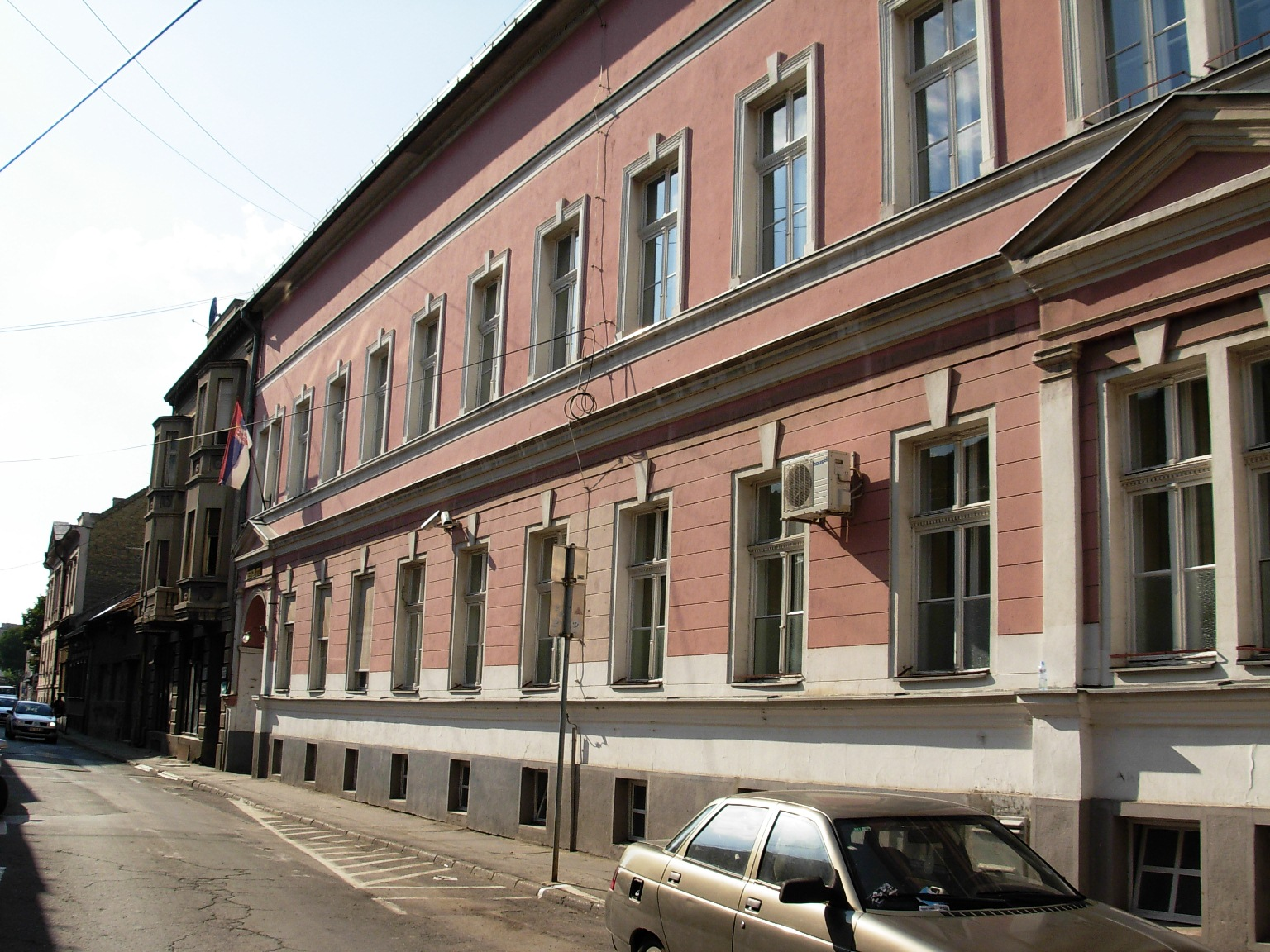 Gimnazija Svetozar Marković u Novom Sadu, avgust 2011.